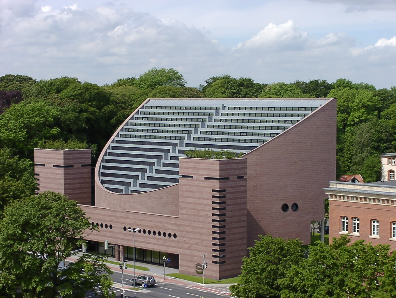 Verwaltungsgebäude der Firma Harting in Minden, Nordrhein-Westfalen. Architekt: Mario Botta